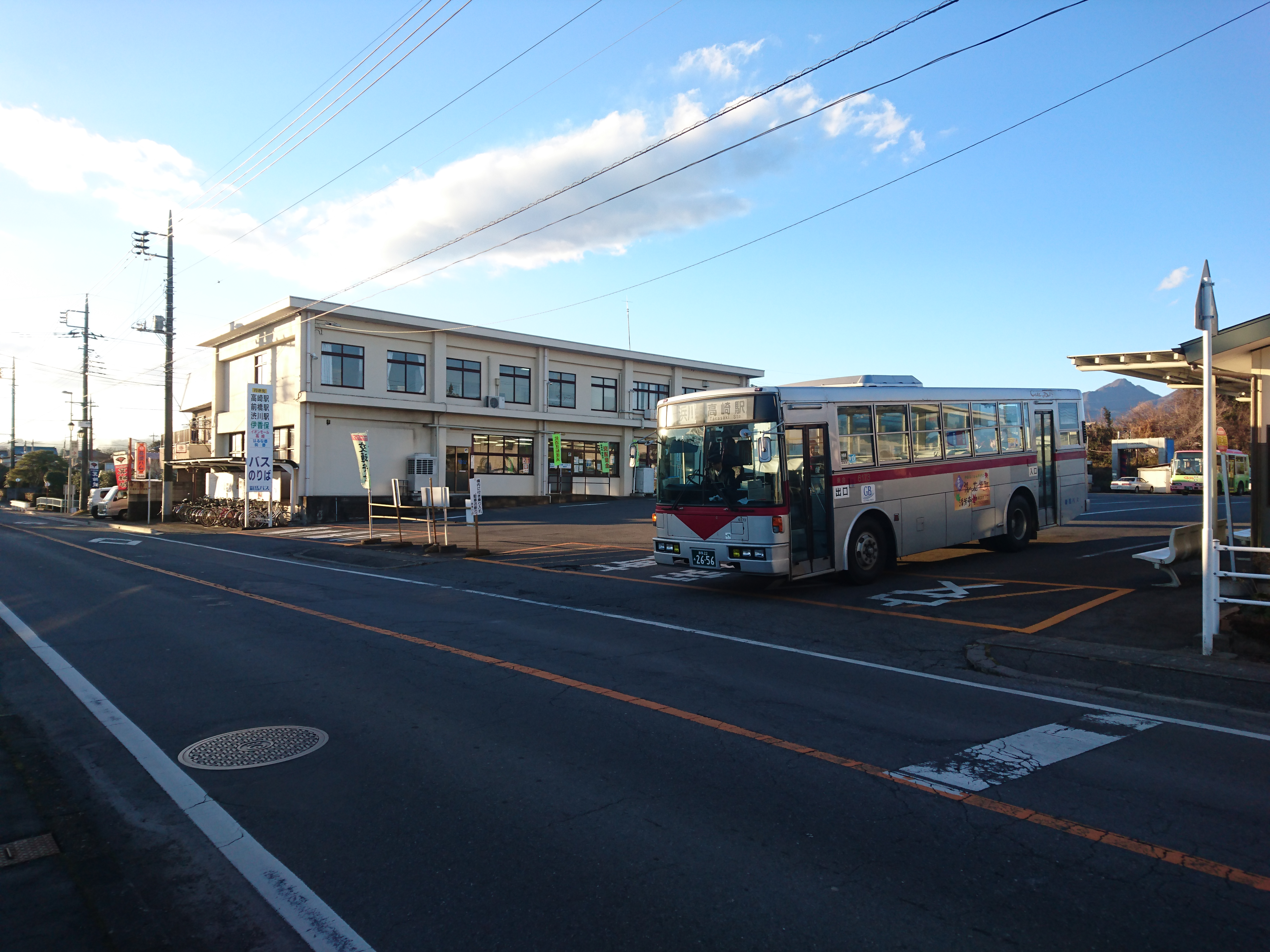 バスセンターの外観とバス発車時の様子。